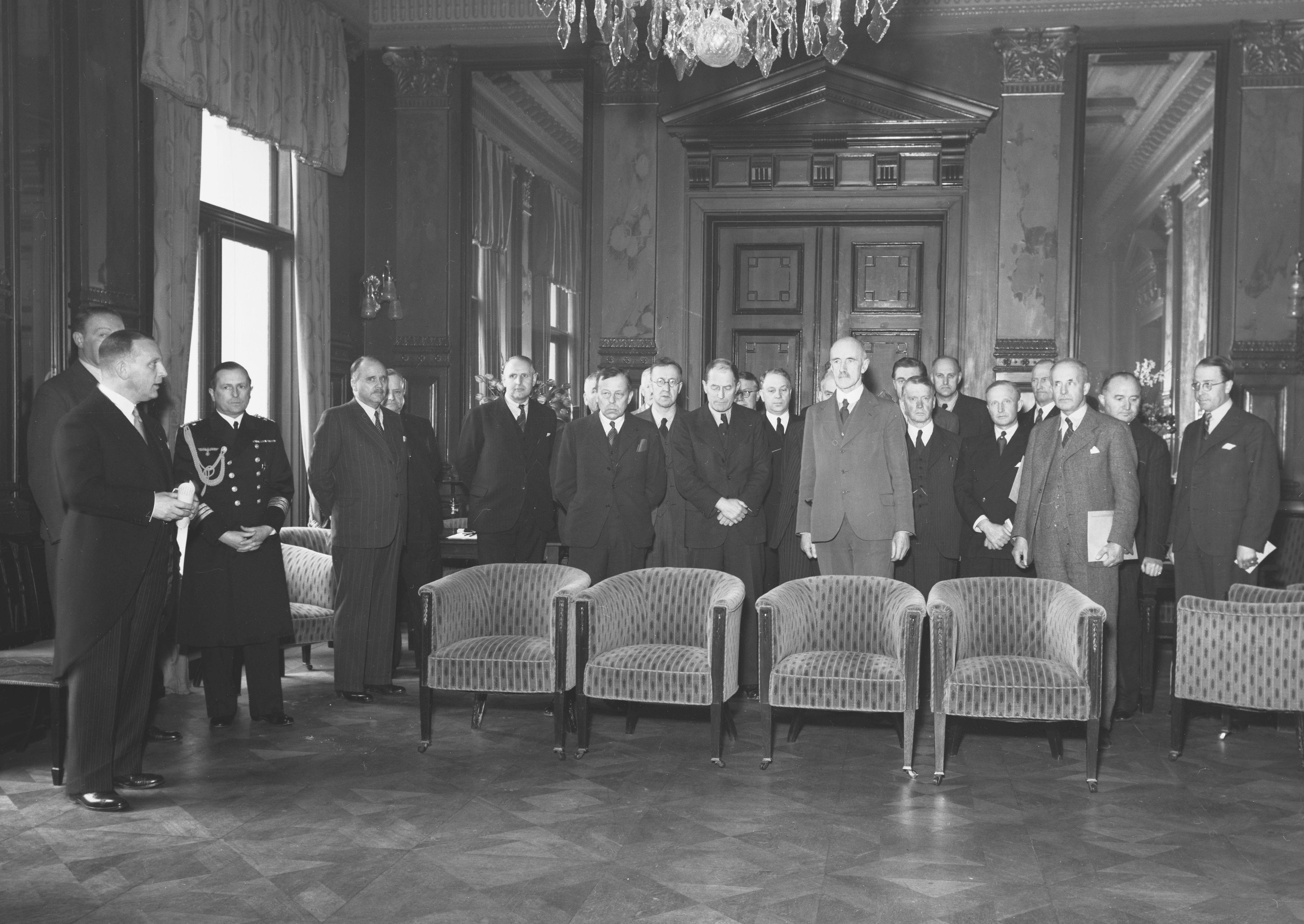 Fra dannelsen av det nye norske Administrasjonsrådet i Vitenskapsakademiet i Oslo 15. april 1940. Administrasjonsrådet ble opprettet av Høyesterett for å ta ansvar for forvaltningen i de tyskokkuperte delene av Norge under andre verdenskrig. Administrasjonsrådet besto av sju medlemmer: sjef for Statistisk Sentralbyrå Gunnar Jahn, direktør for Industriforsyningsdirektorat Jens Bache-Wiik, rektor ved Universitetet i Oslo Didrik Arup Seip, dosent ved Norges landbrukshøgskole Rasmus Johannes Mork, stadsfysikus i Oslo Andreas Diesen og sorenskriver i Nedre Romerike Ole Harbek. Fylkesmann i Oslo Ingolf Elster Christensen ble formann for rådet. 25. september ble rådet avsatt av den tyske rikskommisæren Josef Terboven. I talen sinpå NRK denne kvelden erklærte Terboven at Administrasjonsrådet, kongehuset og Nygaardsvold-regjeringen var avsatt og at alle politiske partier unntatt Nasjonal Samling var oppløst. Beskåret jpeg-fil av PDF kopiert fra Nasjonalbibliotekets bildesamling. Foto: Henriksen & Steen.